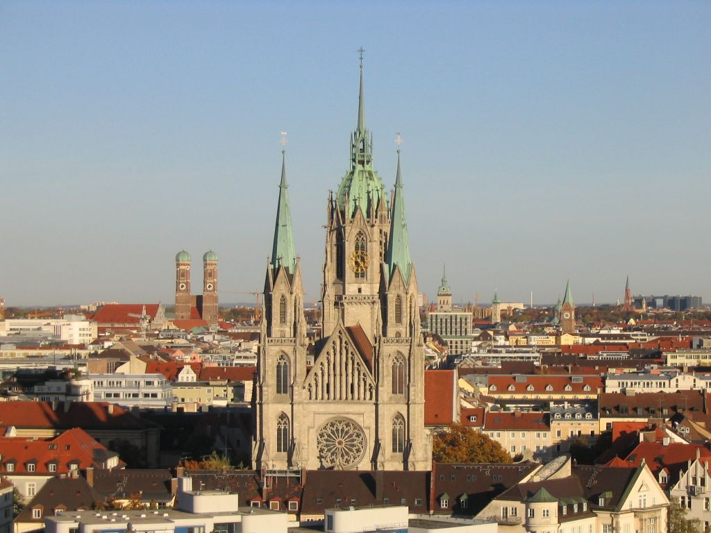 Saint Paul's in Munich